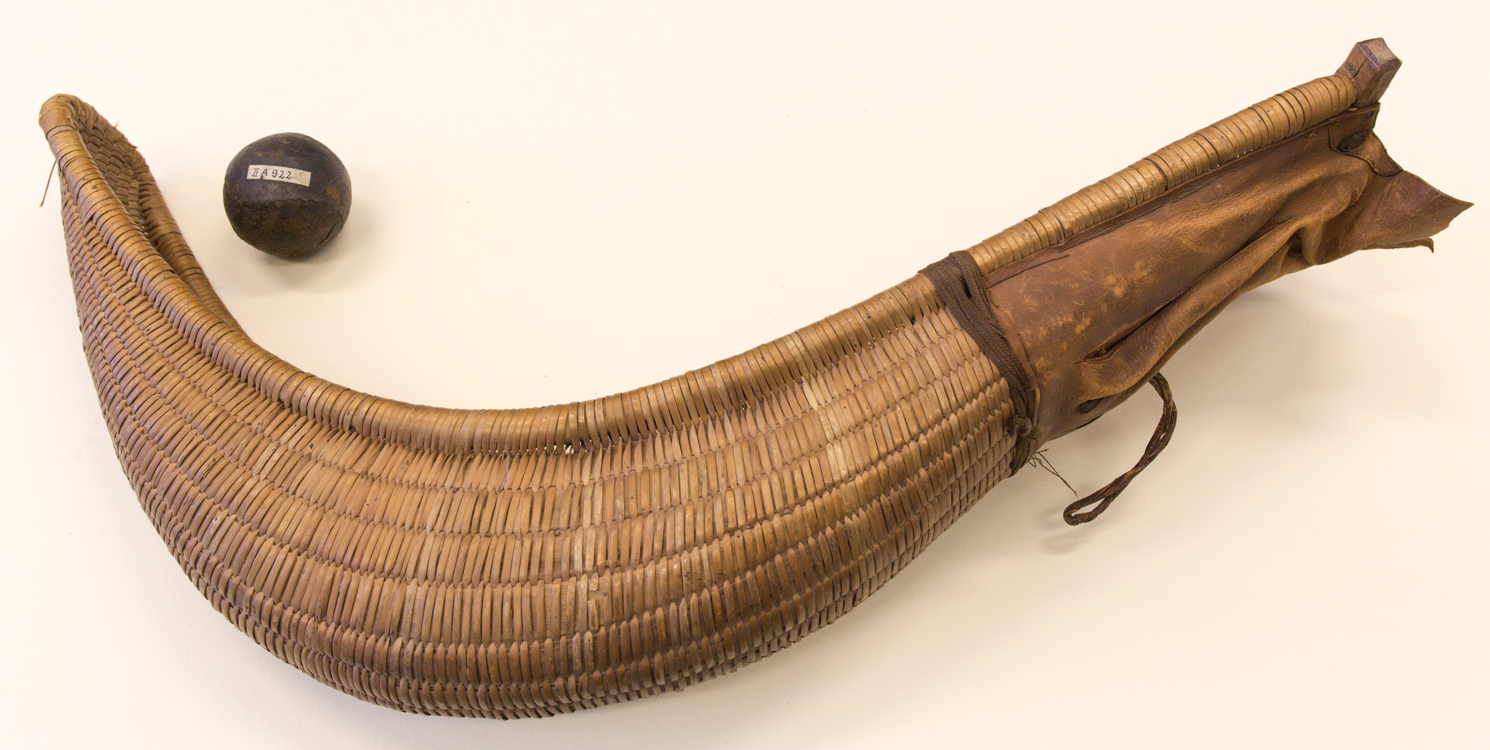 Pelota Ballkorb Identifikationsnummer: II A 925 Geographischer Bezug: Basken (Ethnie); Herkunft: Gipuzkoa, Spanien 65 x 29 x 17 cm Vorbesitzer: Dr. Fritz (Friedrich Karl Georg) Rumpf, Sammler Ausgabe: Korbgeflecht, Leder Geschicklichkeitsspiel „Pelota“, hier Spielvariante „Cesta Punta“ In Gipuzkoa wird meistens mit dem aus Weidenzweigen geflochtenem Wurfhandschuh gespielt. Diese Art Wurfhandschuh kamen erst verhältnismäßig spät in Gebrauch und stammen aus dem französischem Pay Basque. Im Anfange der 60er Jahre des IXI. Jahrhunderts benutzte Dithurbide Gantchiki? der 13 jährige Sohn eines Obstkorbflechters in St. Peé, zum Spiel ein Obstkörbchen aus der Werkstatt seines Vaters statt des Lederhandschuhs. Die Vorteile sind so groß, daß der Vater dem Sohn einen Spielhandschuh (in Form des Lederhandschuhs) aus Weidengeflecht anfertigte. Der lange gebogene Spielhandschuh in der heutigen Form wurde erst 1888 durch Melchior Curuchange in Buenos Aires erfunden. Pelota Ball Identifikationsnummer: II A 922 Geographischer Bezug: Basken (Ethnie); Herkunft: Batzan-Tal, Elizondo, Spanien Vorbesitzer: Dr. Fritz (Friedrich Karl Georg) Rumpf, Sammler Ausgabe: Leder Lederball für „Pelota“-Spiel